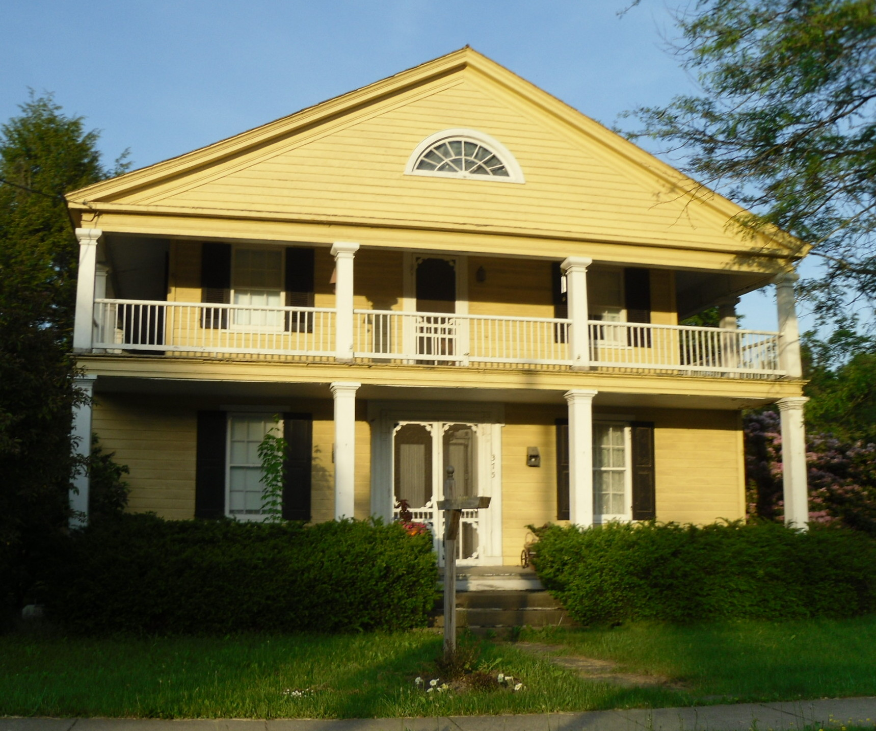 Saegertown, Pennsylvania